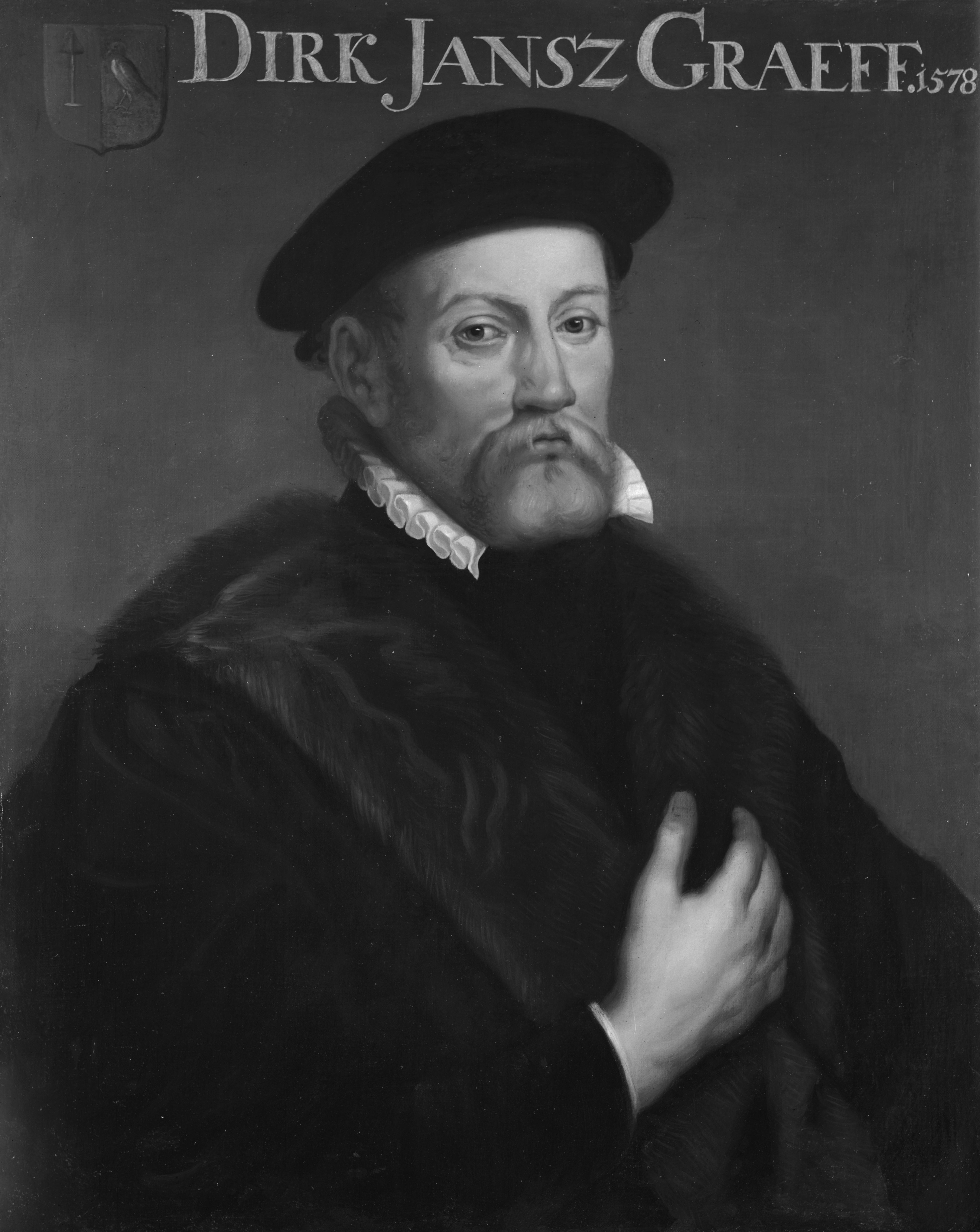 Dirk Jansz Graeff (1532-1589), Reeder und Amsterdamer Bürgermeister